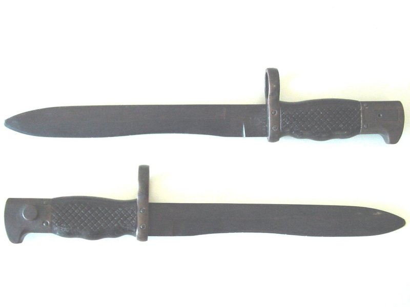 Bayonet FR 8